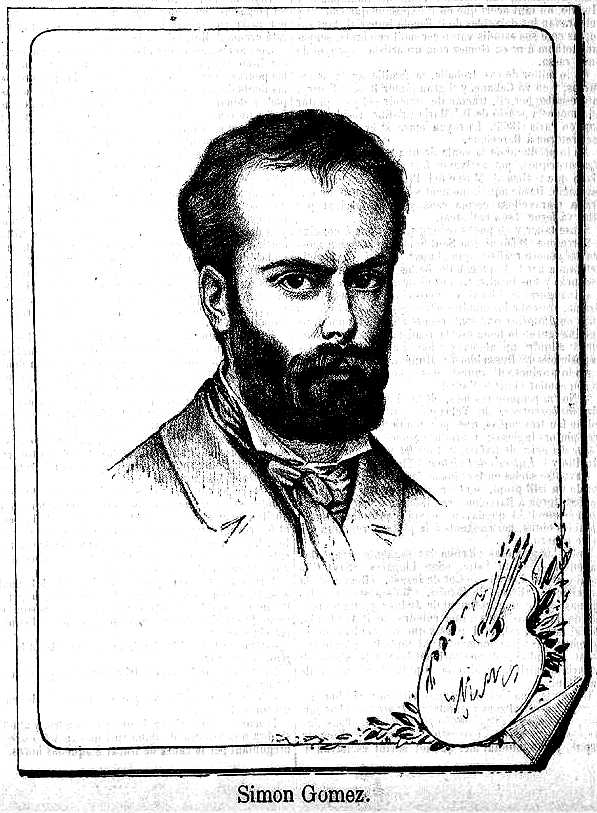 Simon Gomez, pintor, 1880